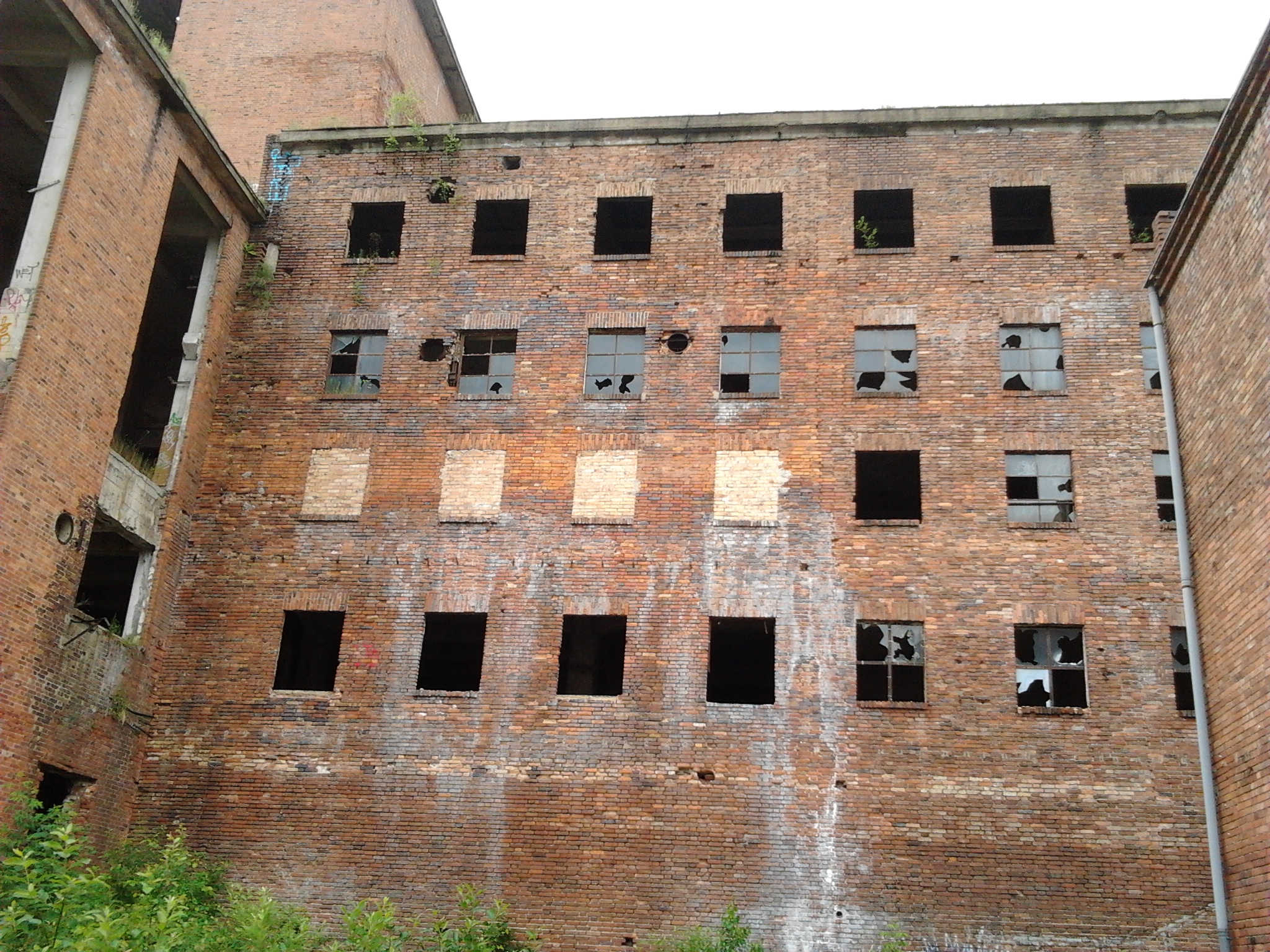 Budynek Celwiskozy z zewnątrz, wejście od strony Jelenia-Plast